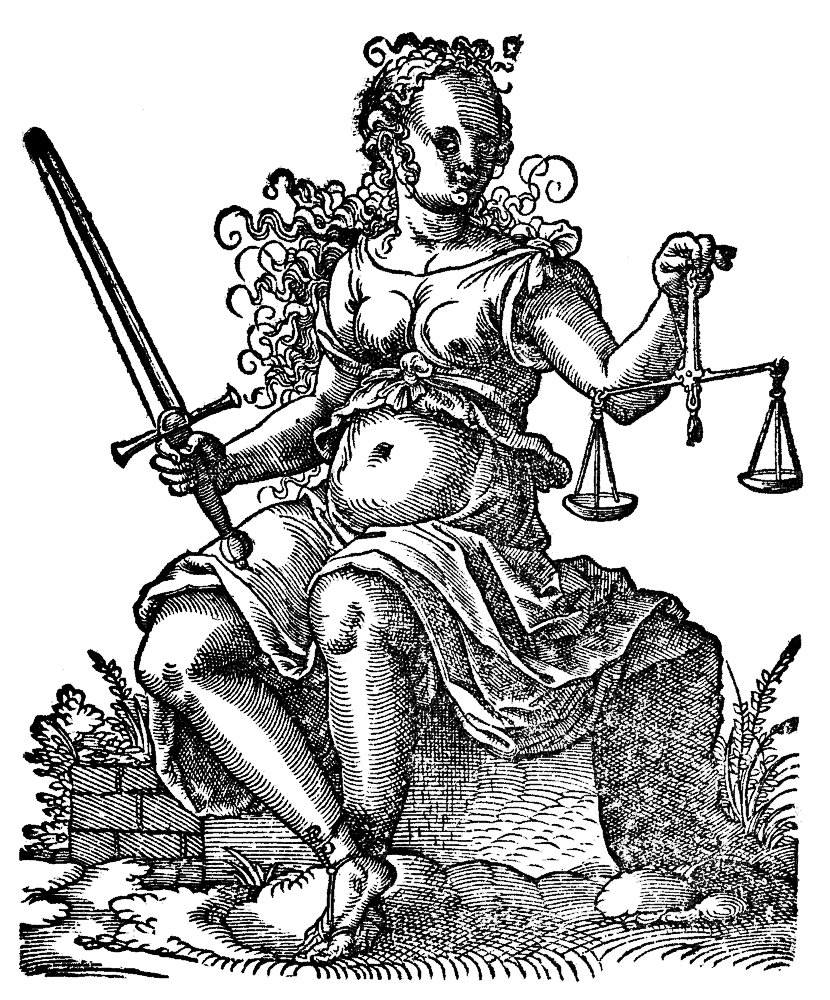 Justitia, Kupferstich von Jost Amman